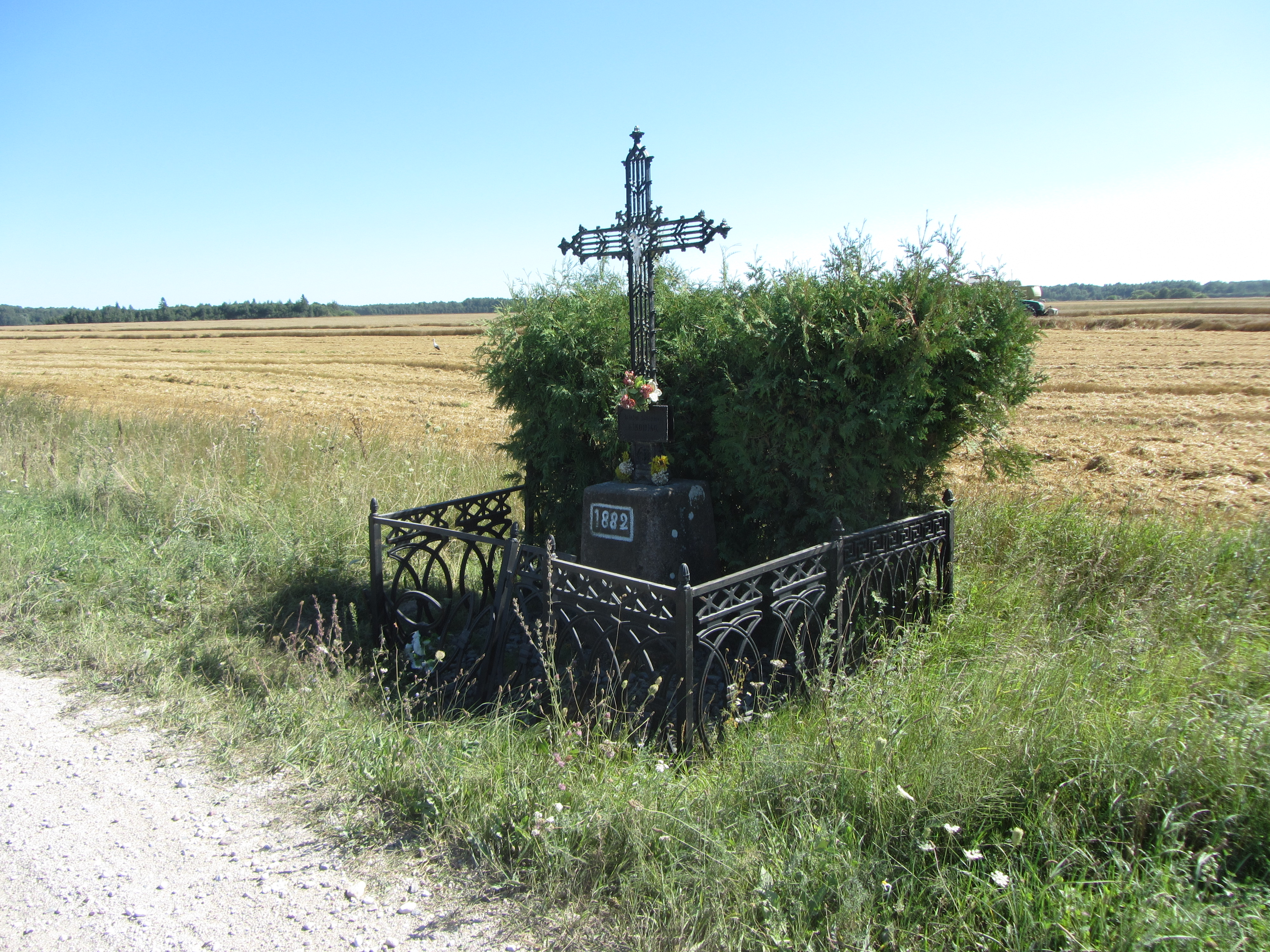 Kupiškio sen., Lithuania